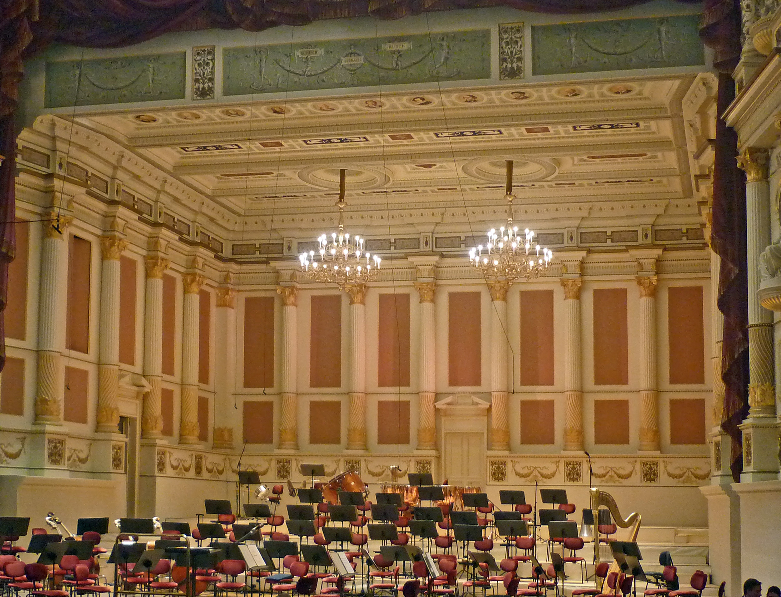 Konzert-Bühnenprospekt, genannt das "Konzertzimmer", in der Semperoper in Dresden. Der Prospekt ist durch Medaillons mit den Köpfen von Musikern und Mäzenen geschmückt. Im Einzelnen sind dies Kurfürst Moritz, Heinrich Schütz, August II., Johann Adolph Hasse, August III., Johann Gottlieb Naumann, Carl Maria von Weber, Gottfried Semper, Richard Wagner, Ernst von Schuch und Richard Strauss. An der Vorderfront stehen die Namen: Ernst von Schuch – Nikolaus Graf von Seebach – Fritz Busch.